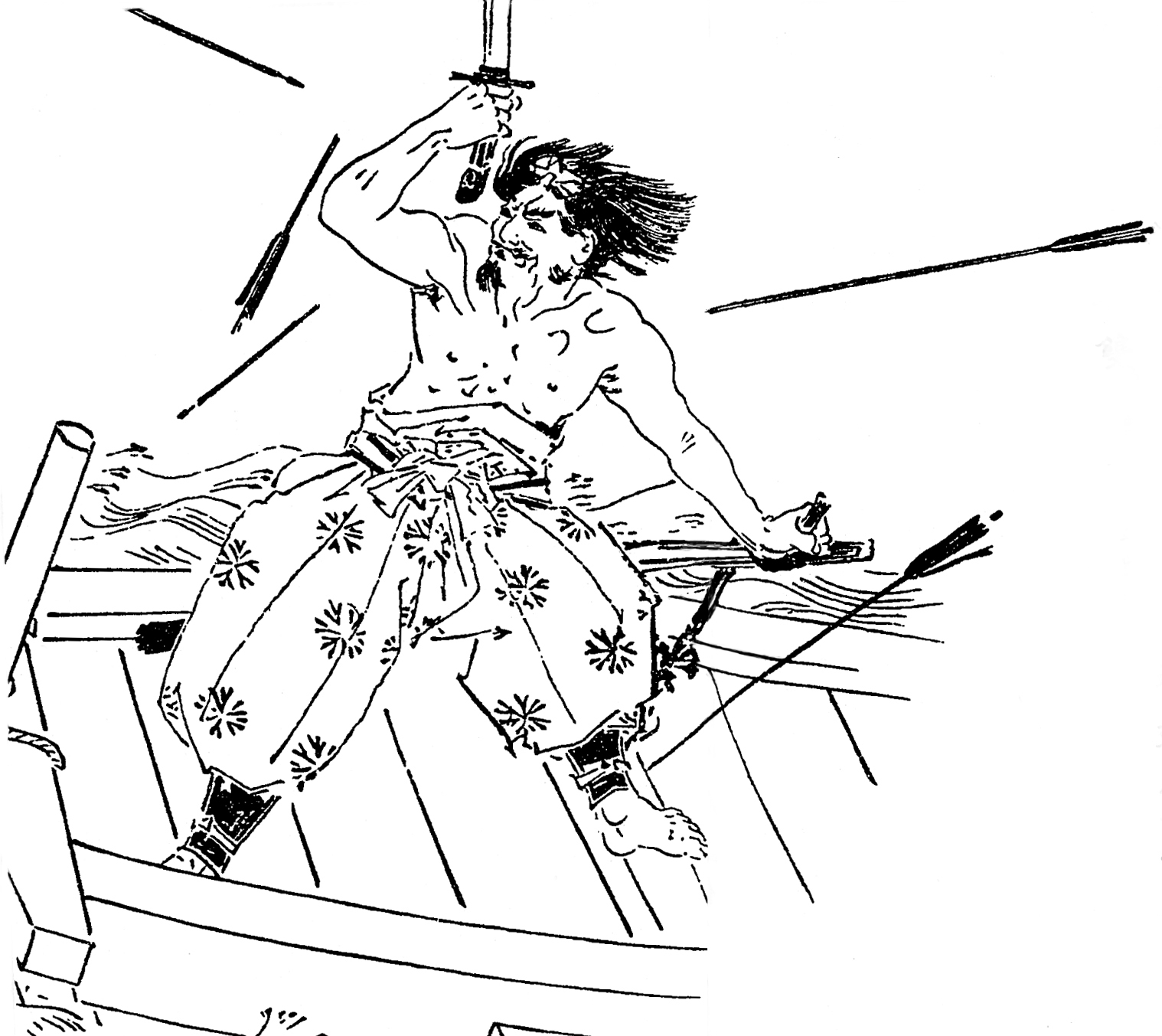 下河辺行平。平安時代末期 - 鎌倉時代初期の武将。／江戸時代『前賢故実』より。画：菊池容斎